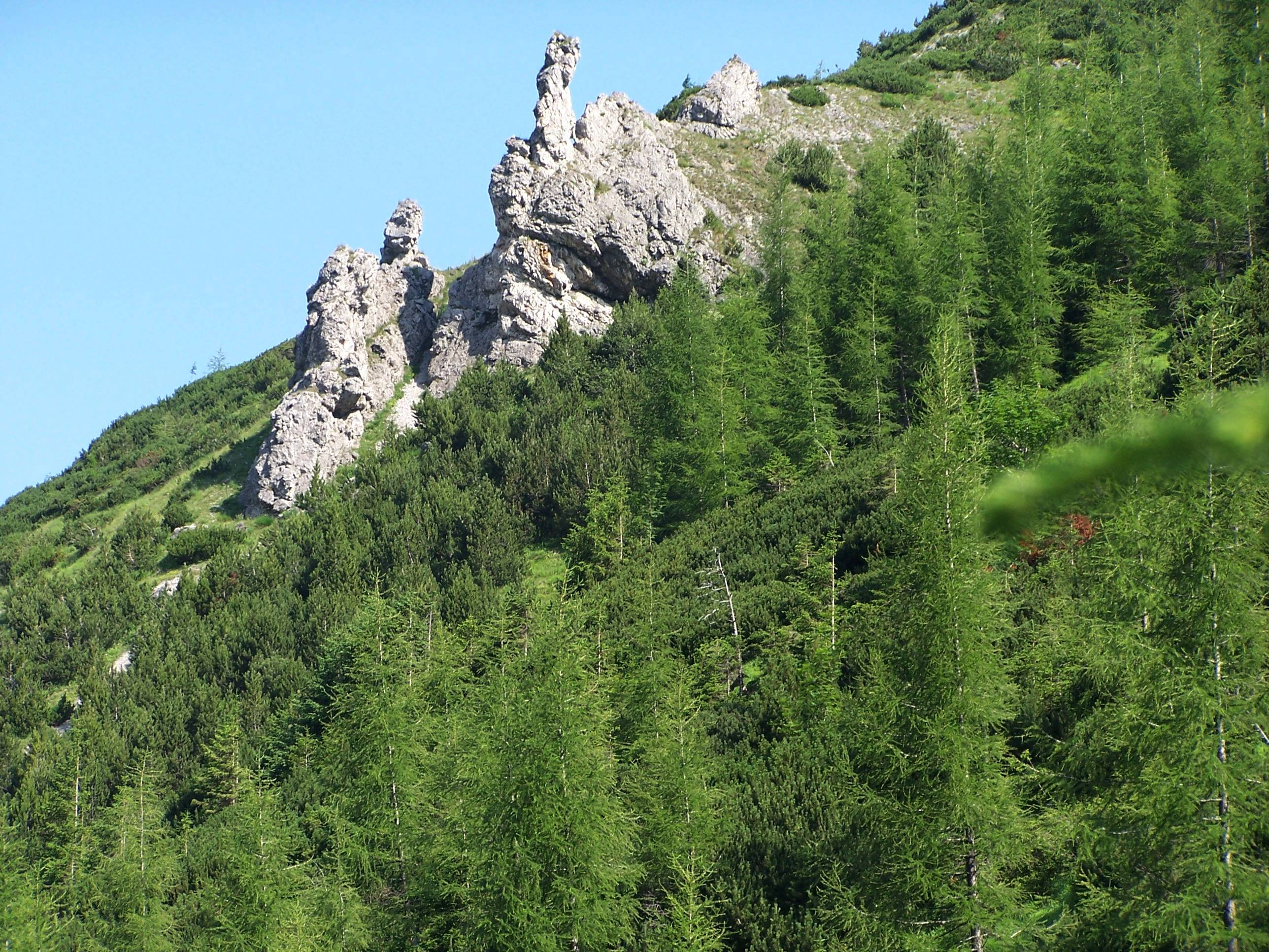 Dolina Jaworzynki (Tatra Mountains)